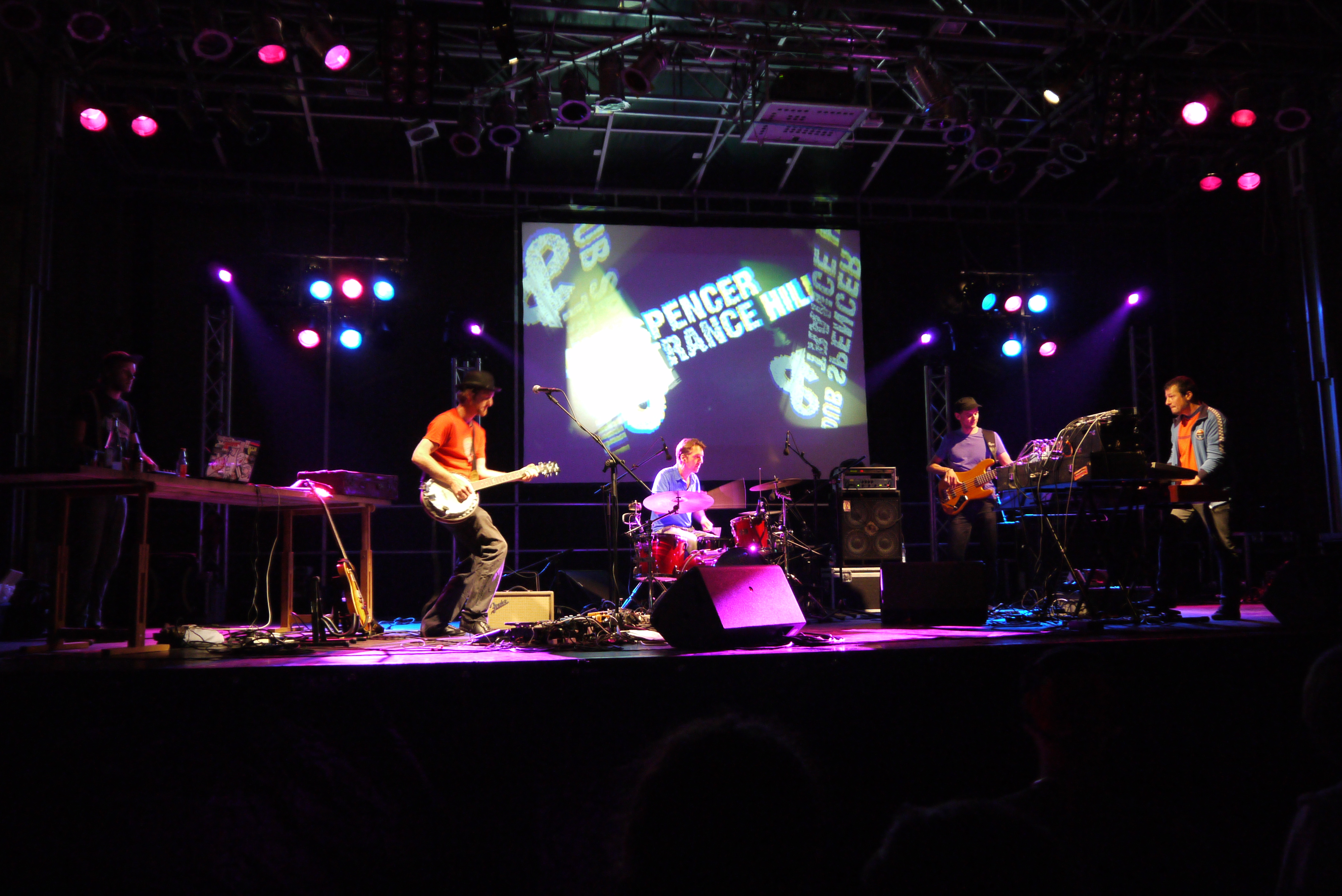 Dub Spencer & Trance Hill am 03.08.2012 auf der 24. Detmolder Sommerbühne